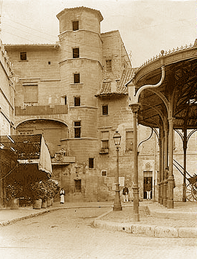 Cliché de la Livrée du cardinal de Florence, Pierre Corsini, détruite en 1898